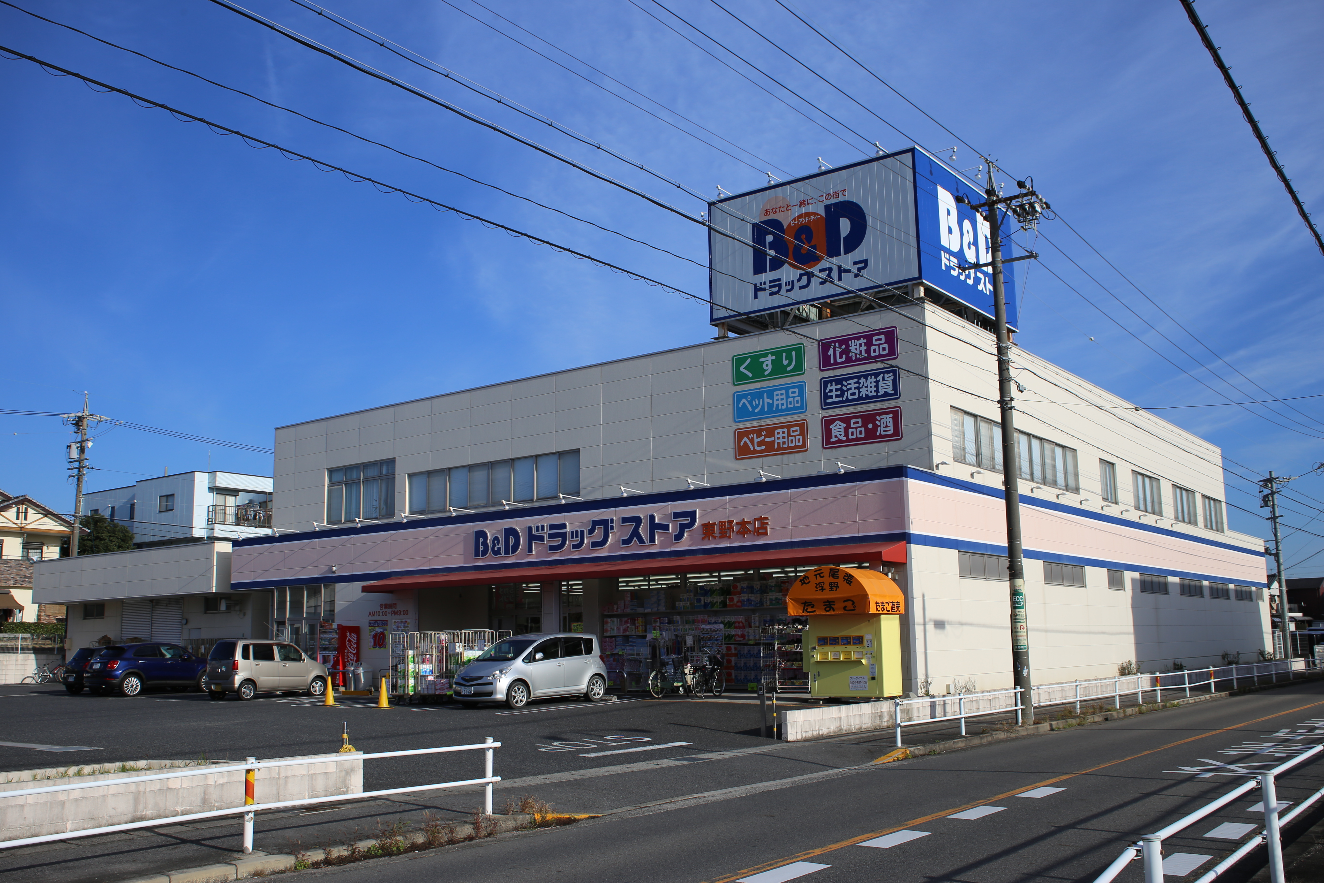 愛知県春日井市東野町のB&Dドラッグストア東野本店および本社